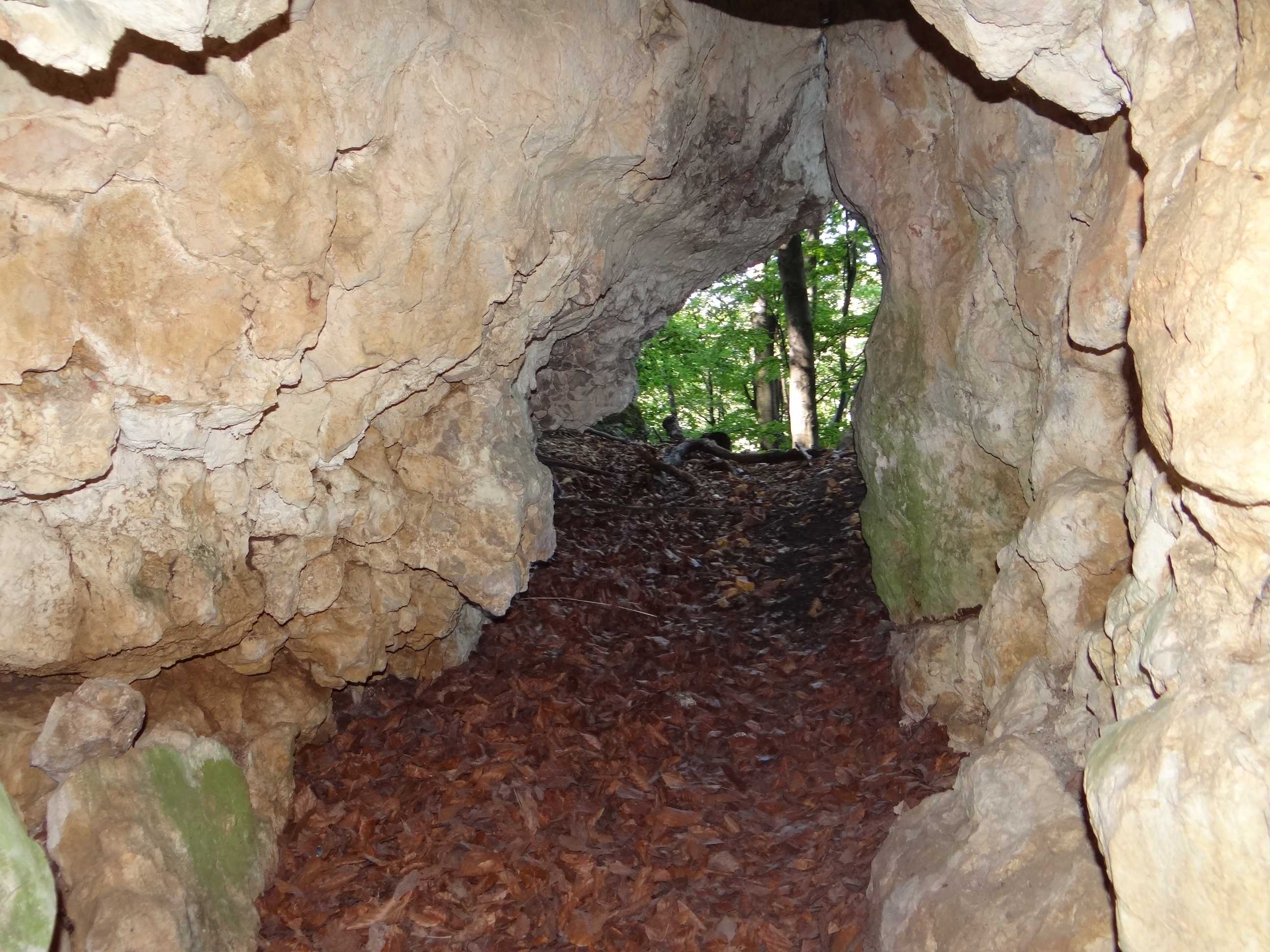 Jaskinia nad Źródłem v